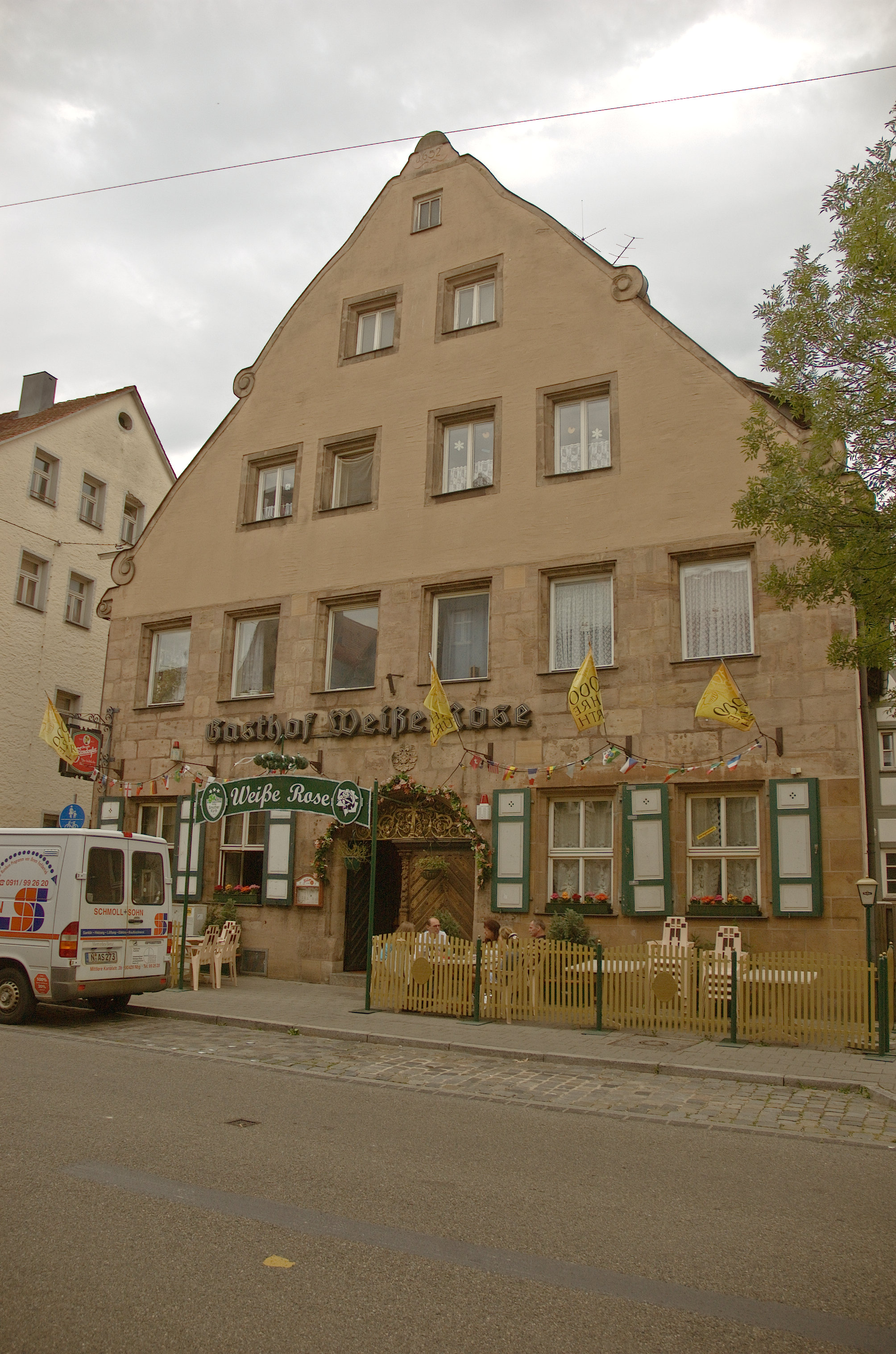 Gasthof Weiße Rose in Fürth